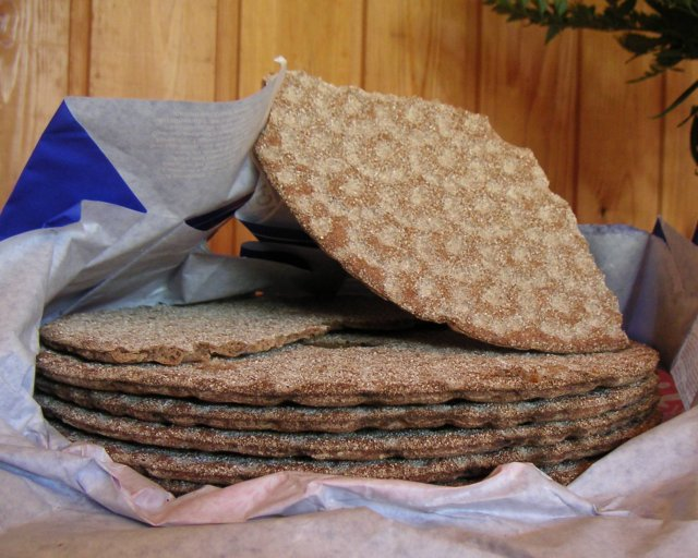 Some slices of knäckebröd.